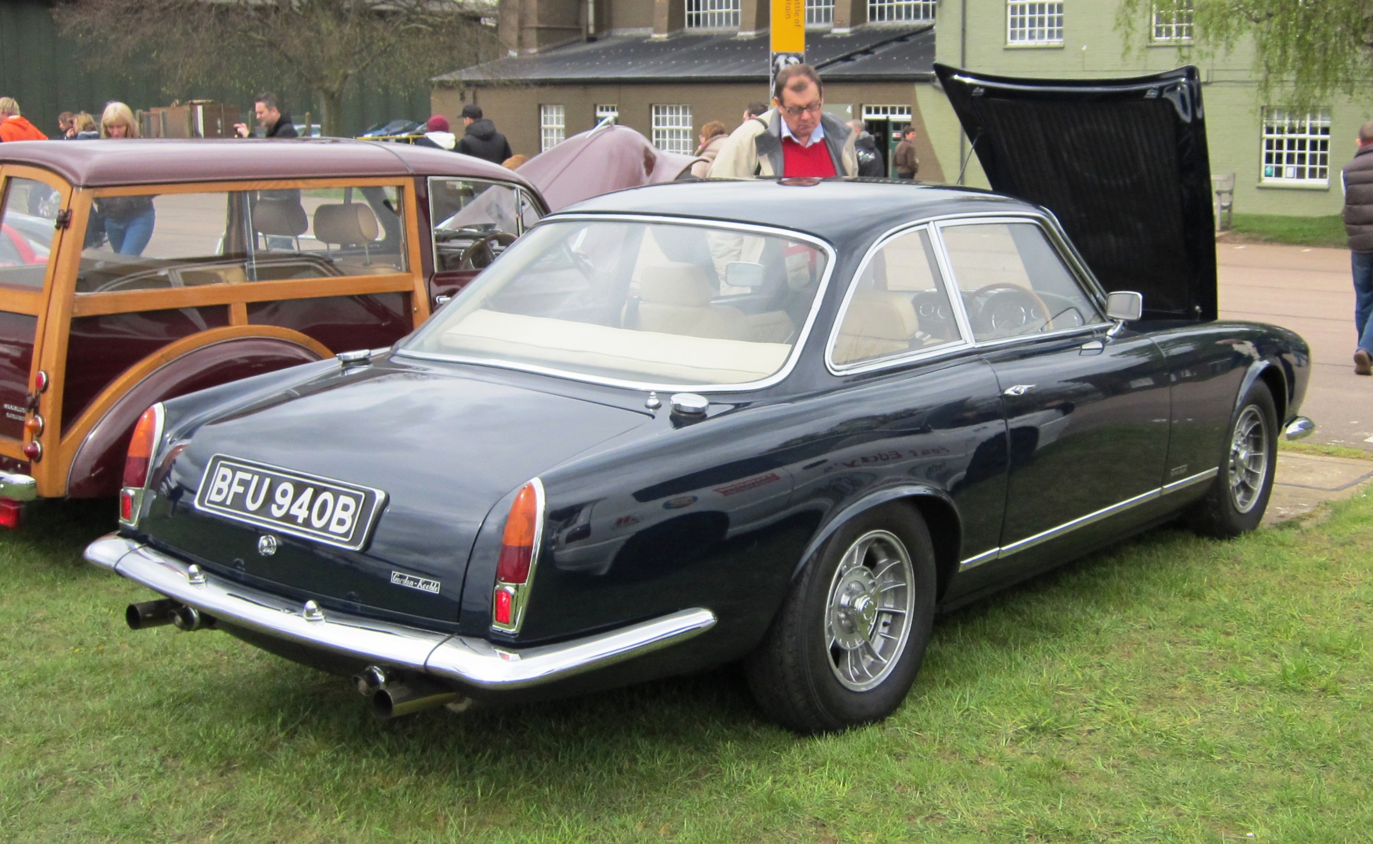 Gordon-Keeble at Duxford